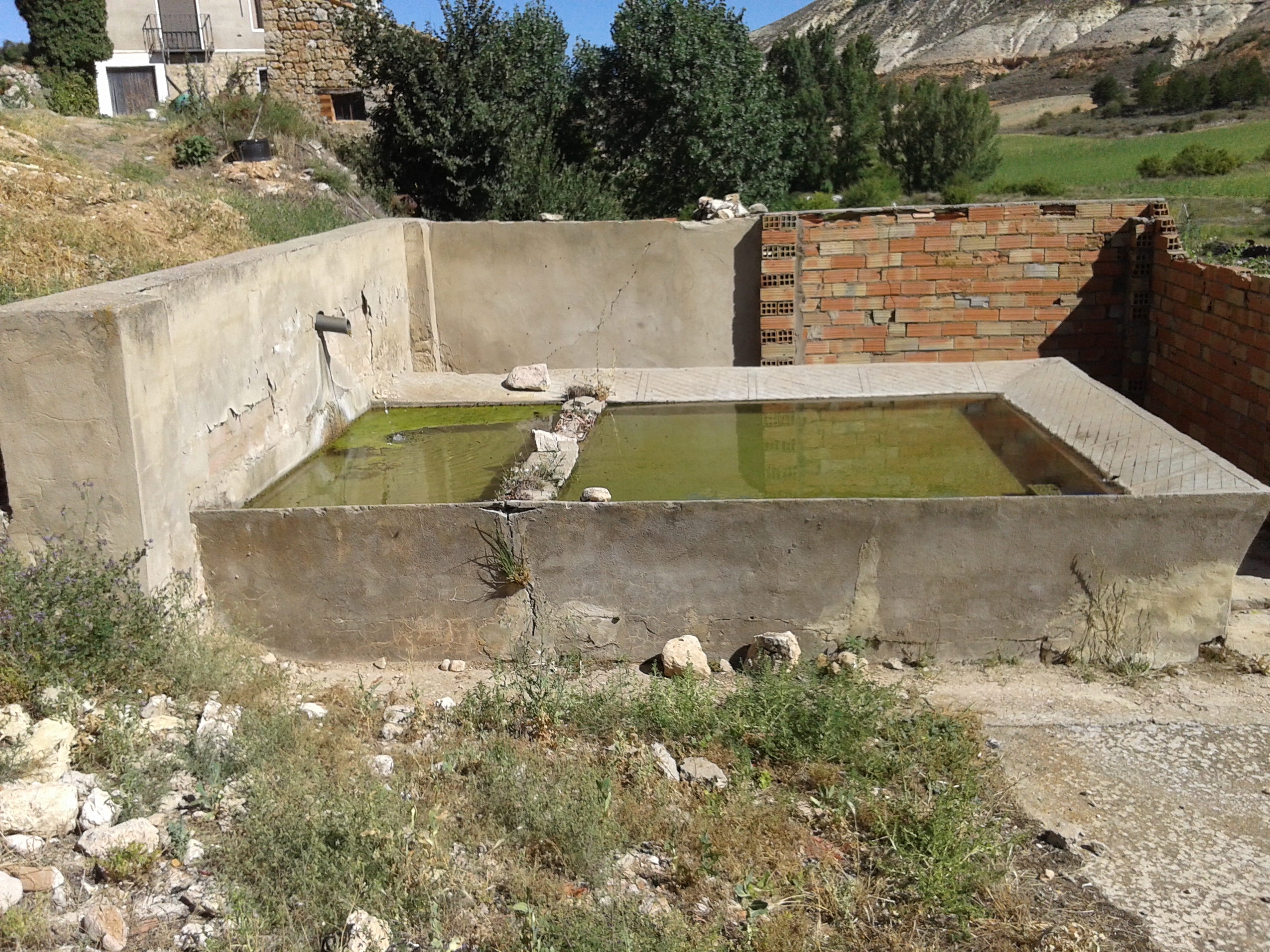 Lavadreos de Jodra de Cardos.